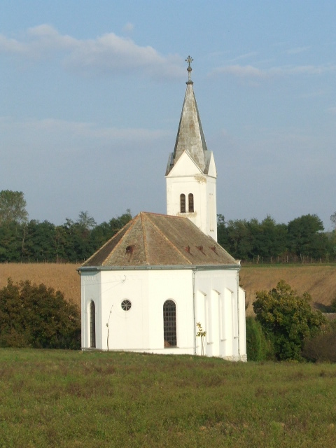 Nagyhajmás, evangélikus templom